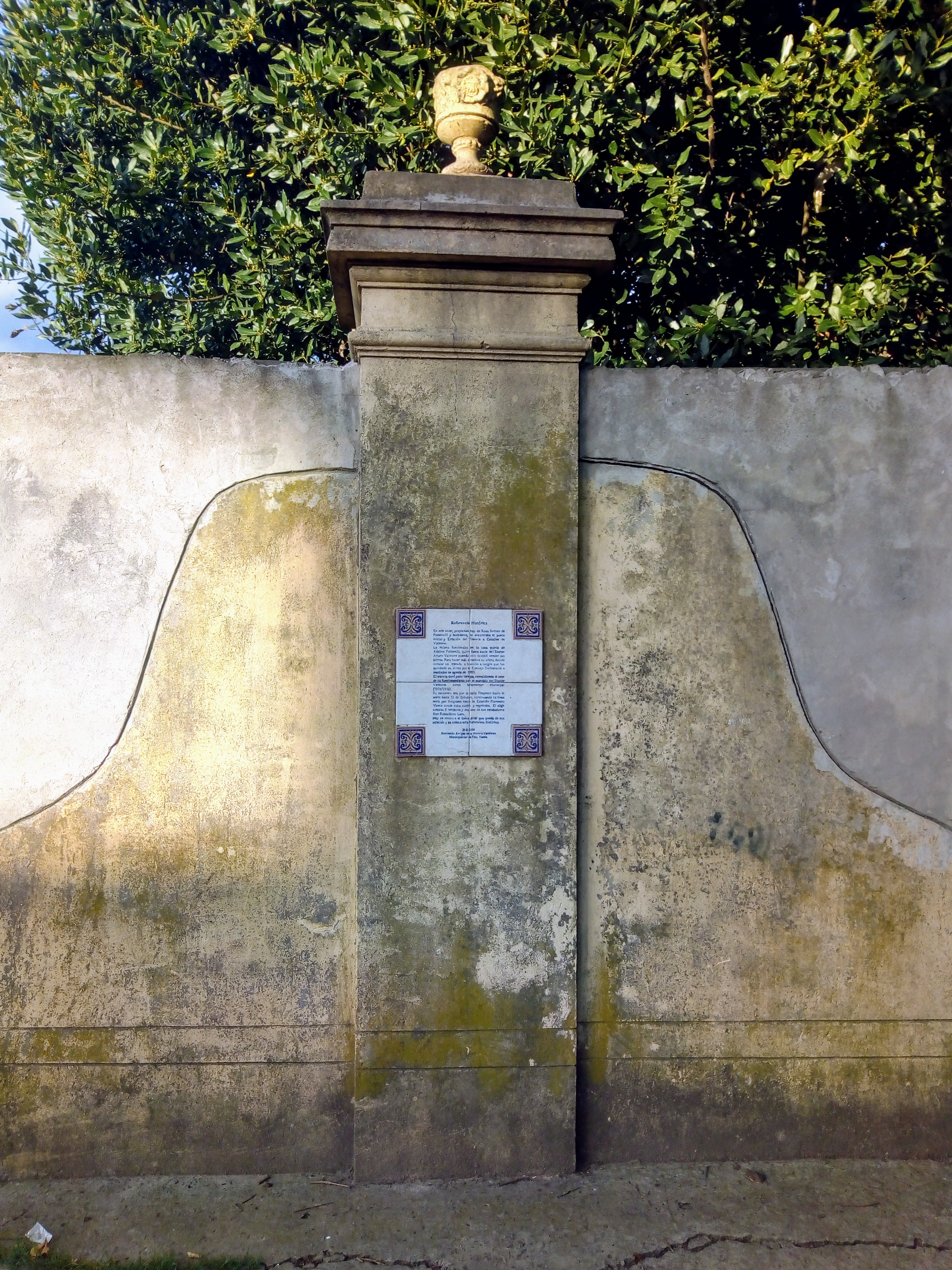 Villa Vatteone